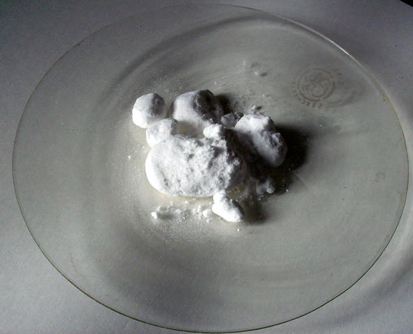 K2SO4